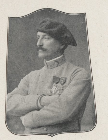 Le Chef de Bataillon SUTTERLIN. Commandant le 1er Bataillon [du 3e RI]. [Il porte ici l'uniforme du 120e RI, dont il commande le 5e bataillon, déployé dans les Balkans].